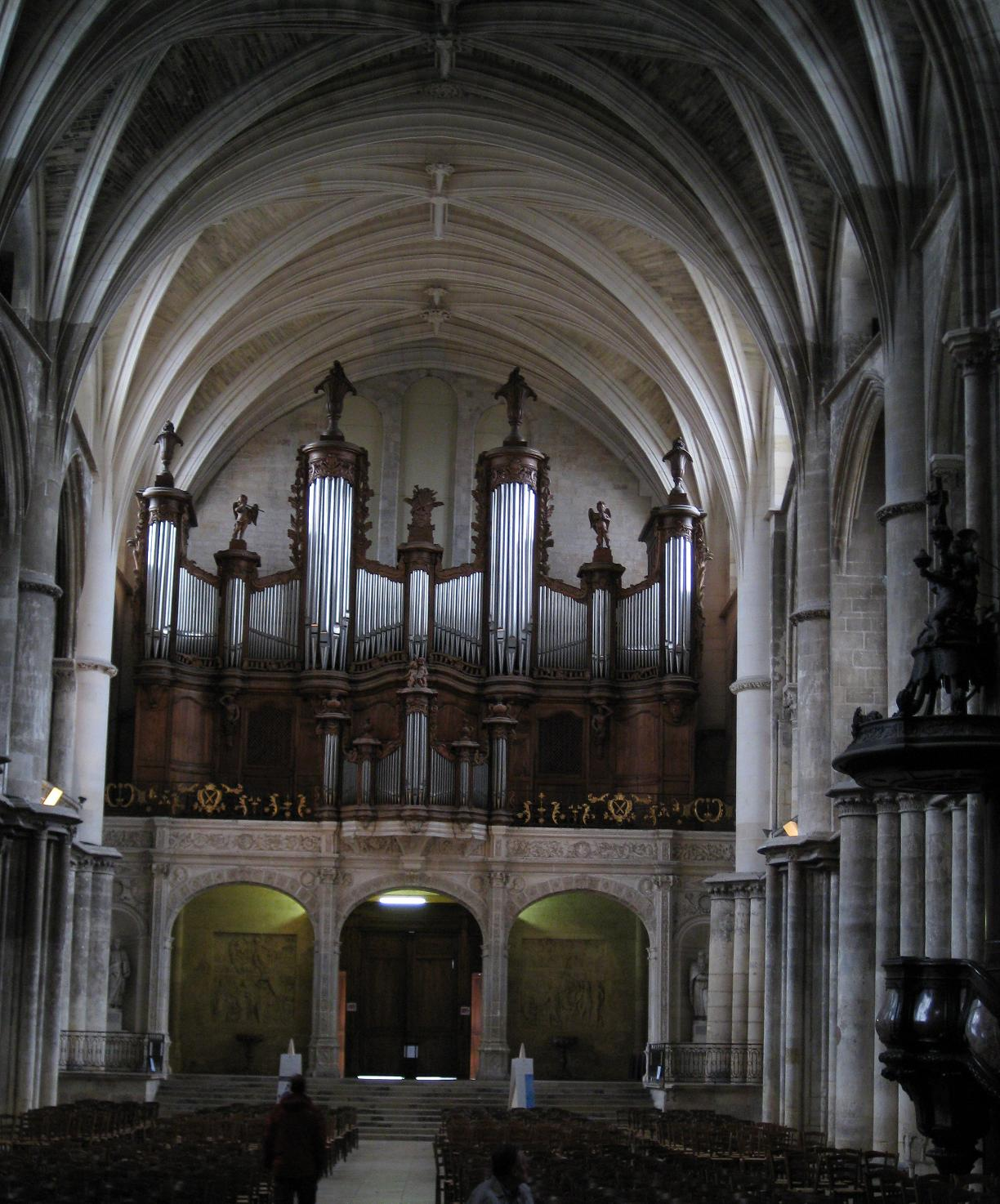 Grandes orgues de la Cathédrale Saint-André de Bordeaux en 2009. This object is classé Monument Historique in the base Palissy, database of the French furniture patrimony of the French ministry of culture, under the references PM33000878 and PM33000877.